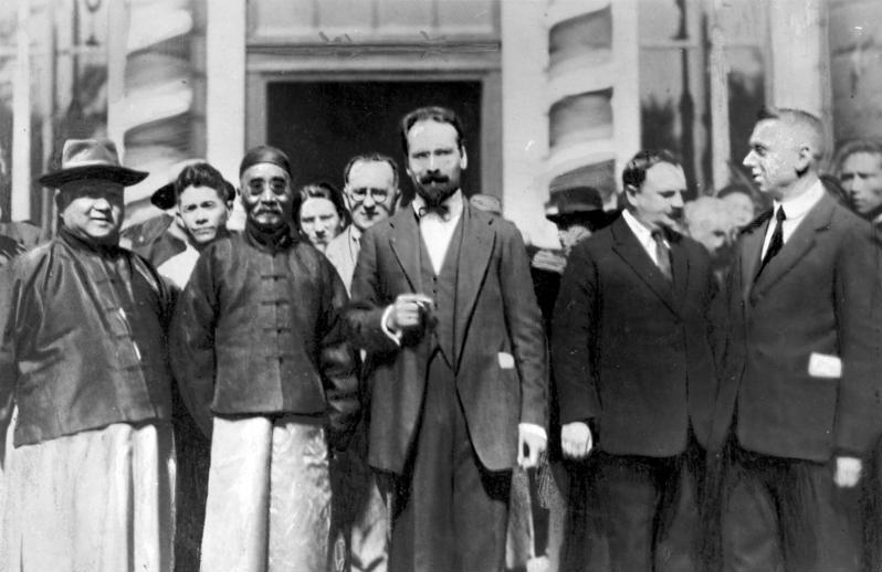 ADN-ZB/Archiv China. Dier Oktoberrevolution in Rußland 1917 übte einen großen Einfluß auf China aus. Marxistisch-leninistische Ideen fanden weite Verbreitung unter der bevölkerung. Die Sowjetunion versuchte, die seit 1919 entstehende revolutionäre Bewegung zu unterstützen. Leo Michailowitsch Karachan, von 1924 bis 1926 sowjetischer Botschafter in China, spielte dabei eine wichtige Rolle. Karachan ( Mitte ) im Februar 1925 in Peking. 1189-25